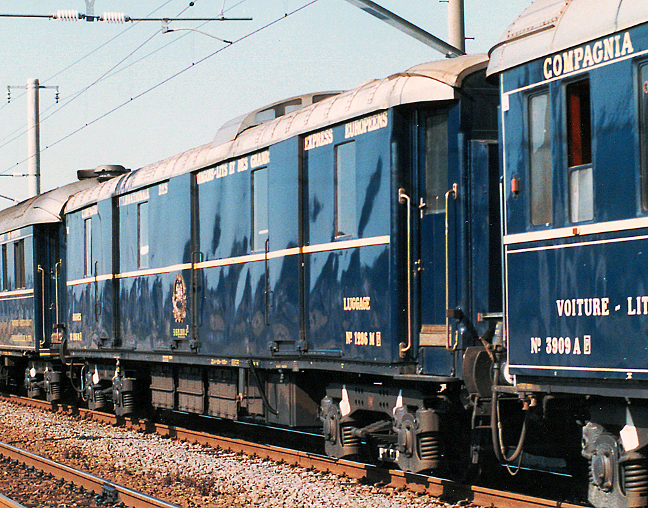 ORIENT EXPRESS '88 Luggage No.1286 M